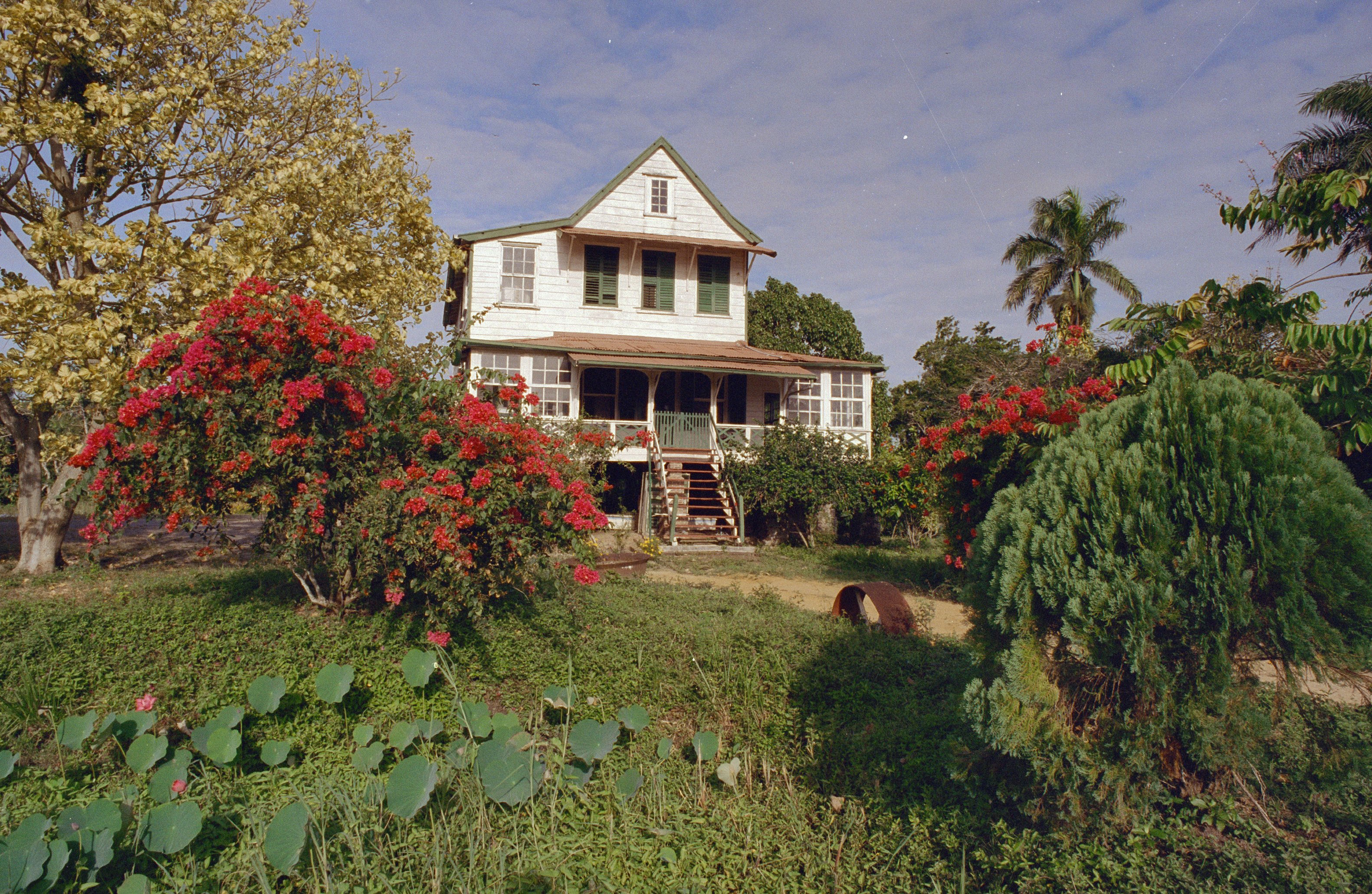 Koloniale geschiedenis: Overzicht huis met omgeving (opmerking: Suriname Reis Loek Tangel)